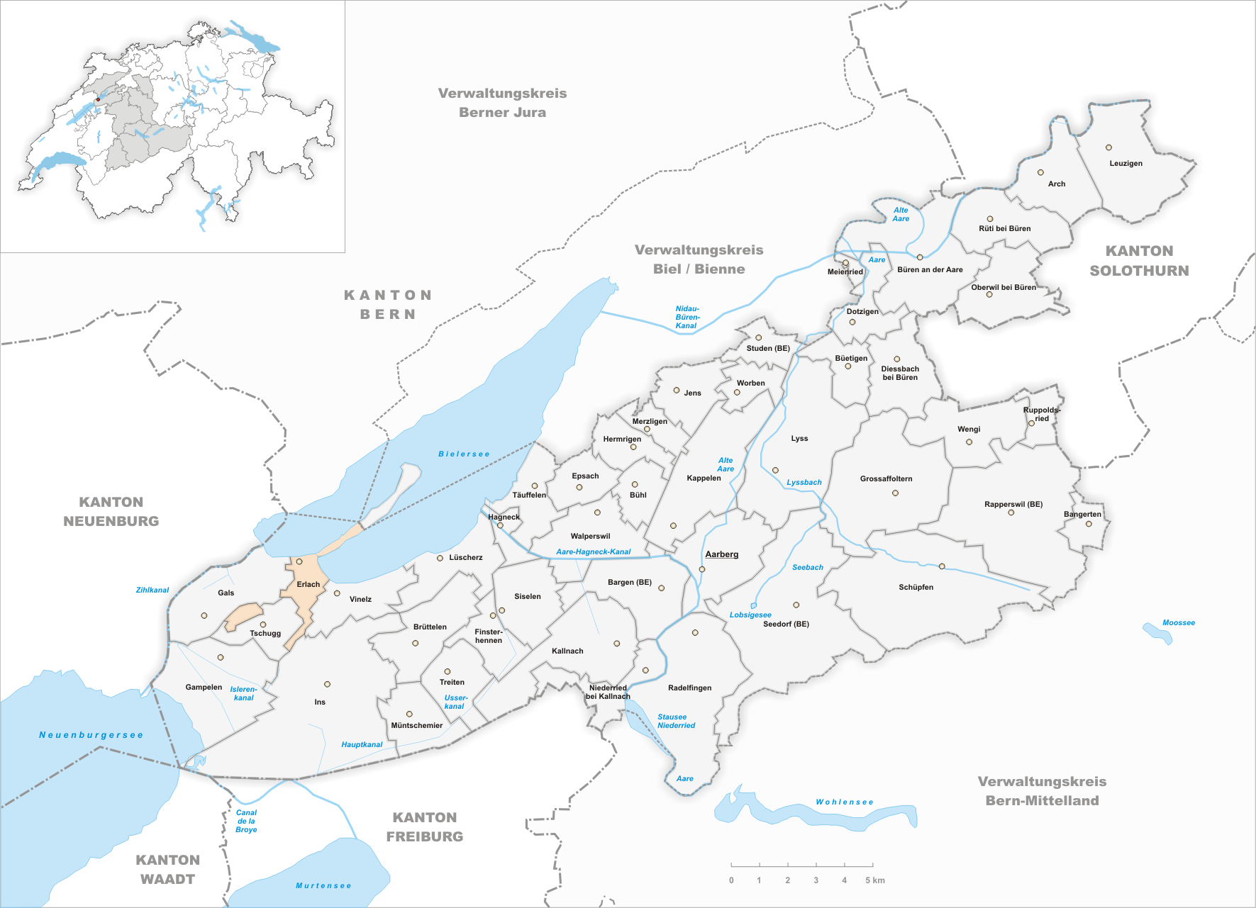 Municipality Erlach